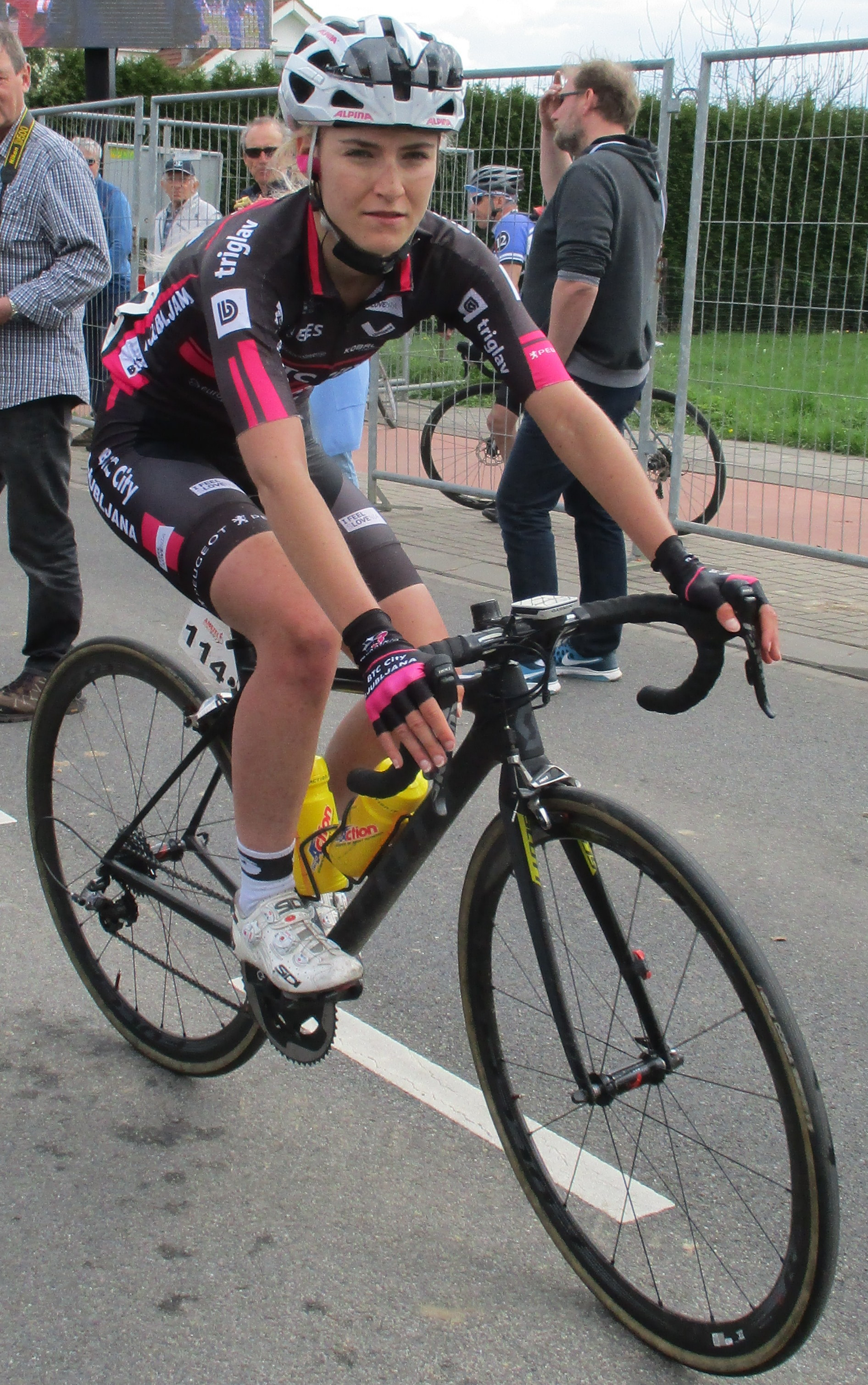 Finish van de Amstel Gold Race Ladies Edition 2018 in Berg, Valkenburg aan de Geul.